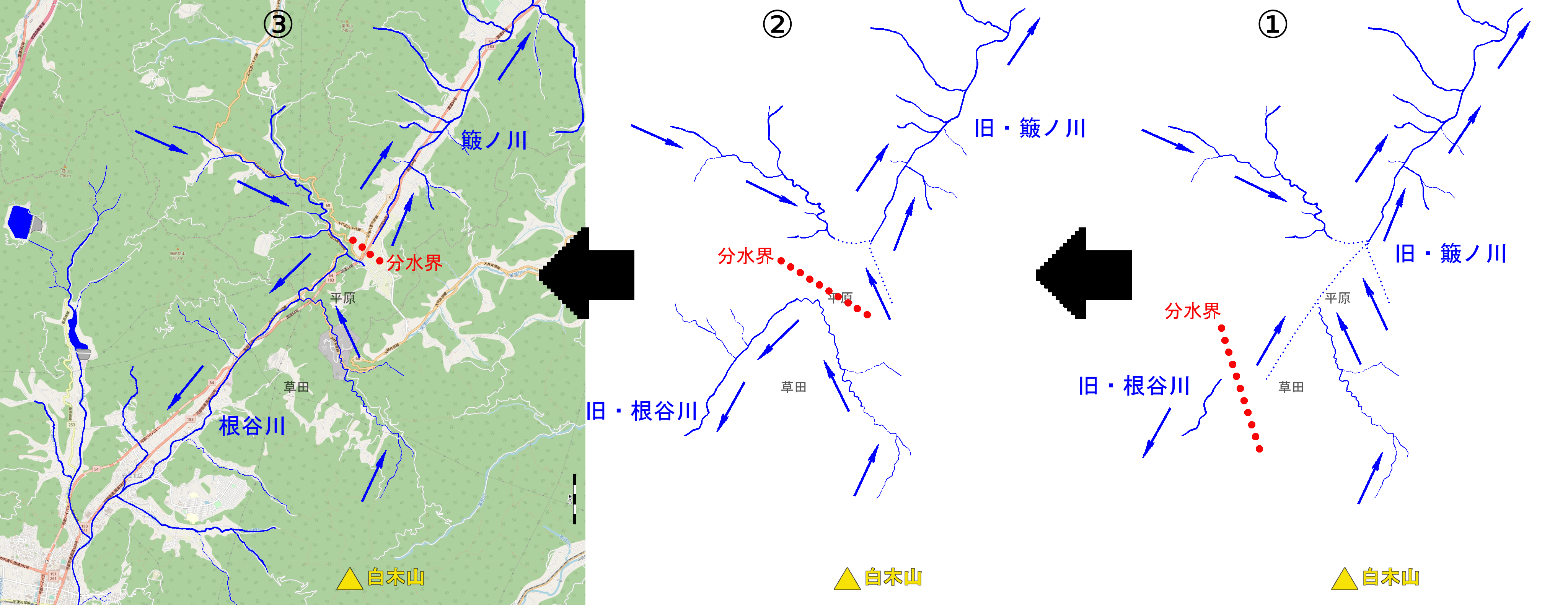 広島県安芸高田市の上根峠周辺の河川争奪過程 This map may be incomplete, and may contain errors. Don't rely solely on it for navigation.